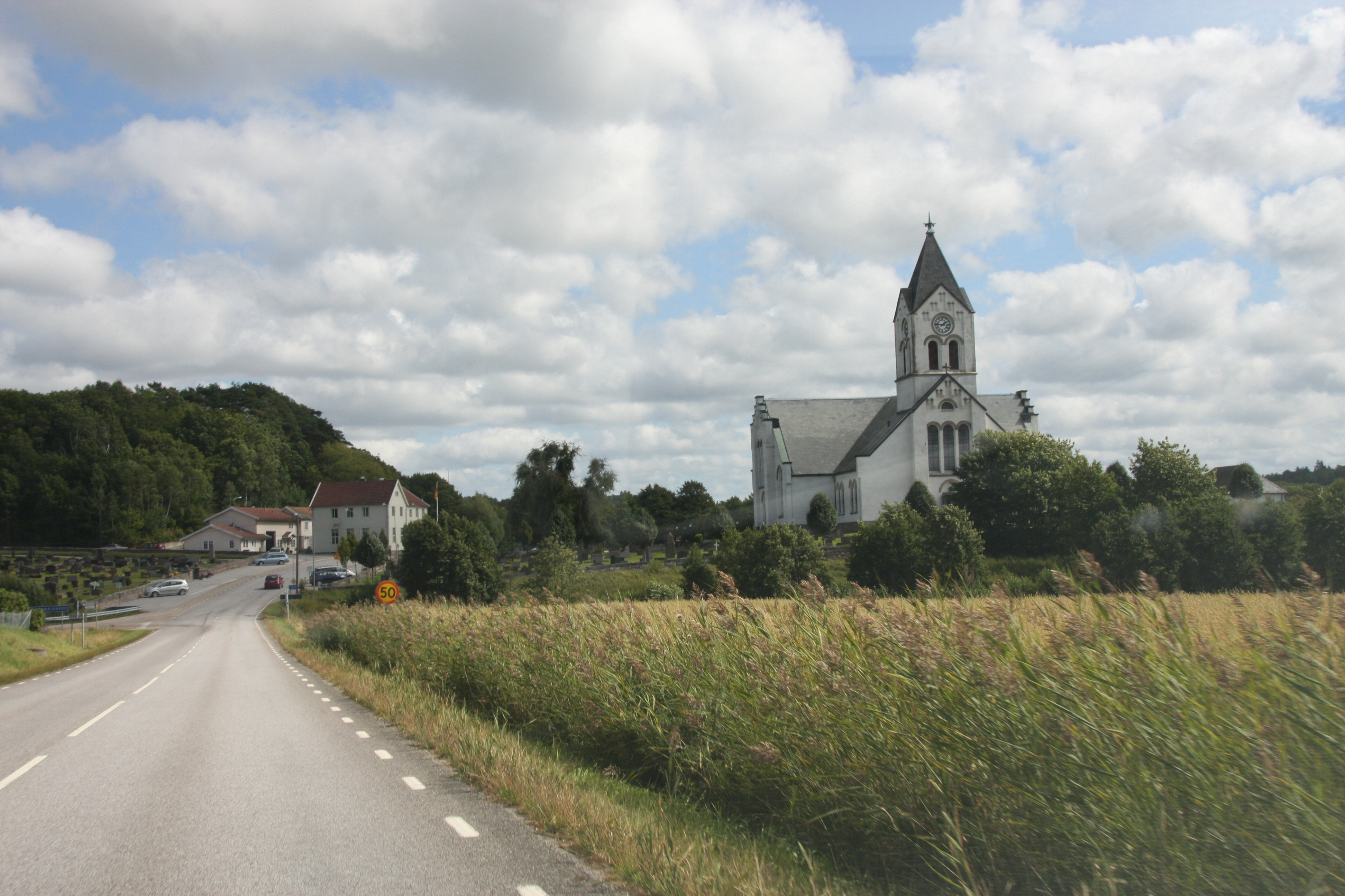 Kville sockenkyrka i Tanums kommun, Bohuslän. Kyrkan från 1800-talet står på stället vart en äldre kyrka har varit.